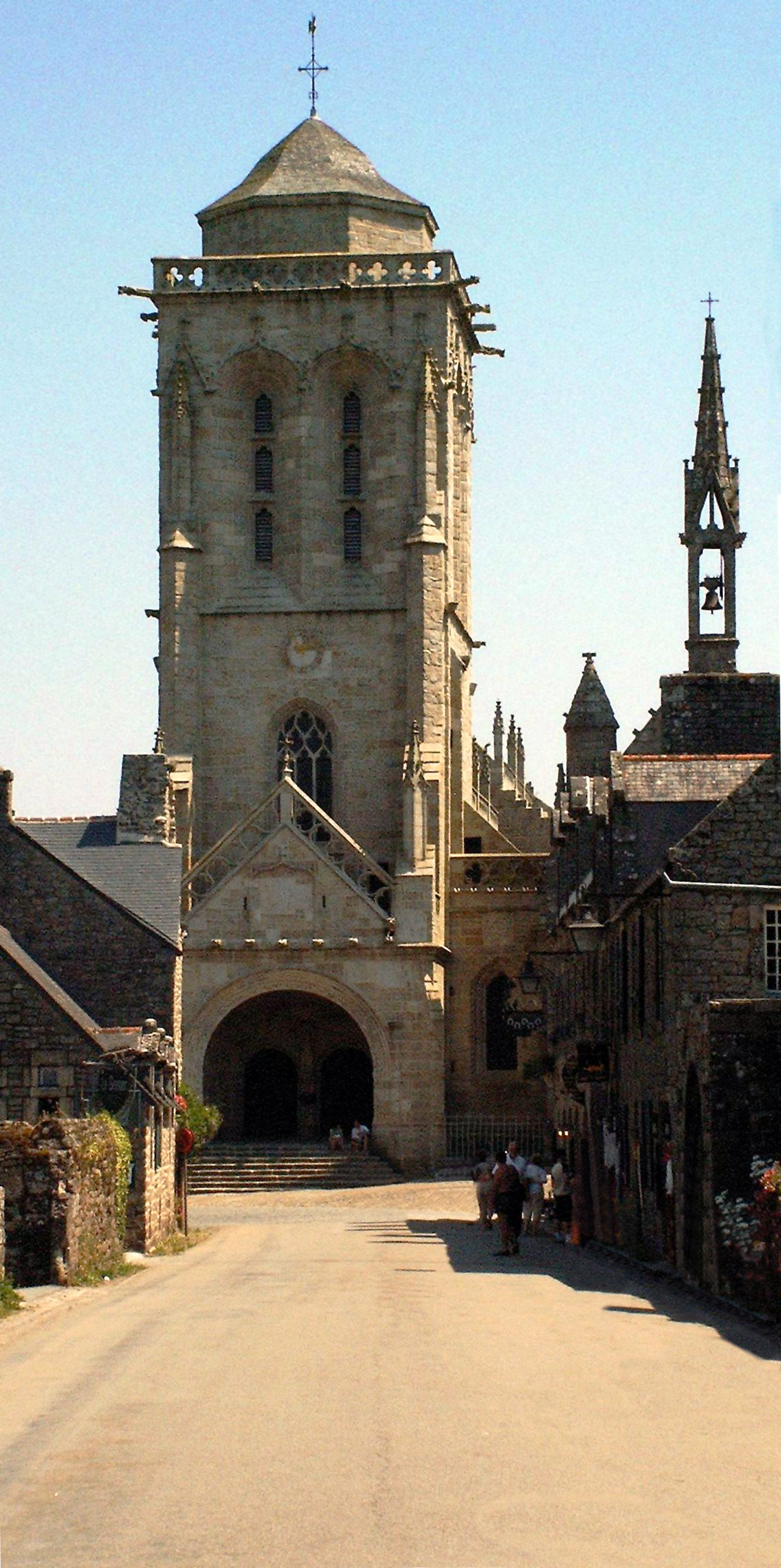 Kirchturm der Église Saint-Ronan in Locronan, Finistére, Bretagne